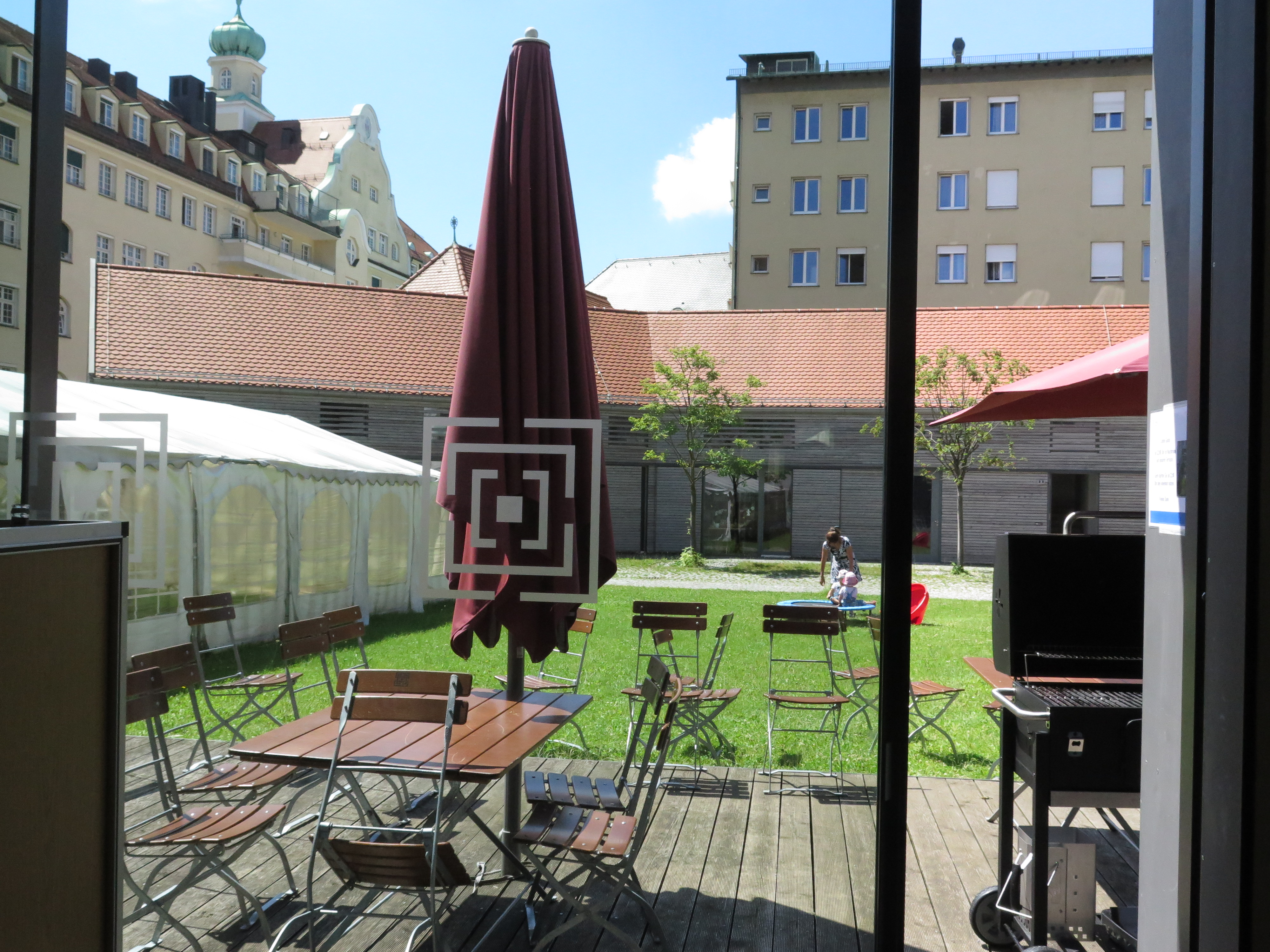 Blick durch die Glasschiebetür des Speiseraums des Instituts zur Förderung publizistischen Nachwuchses, und in die Gartenanlage des Instituts